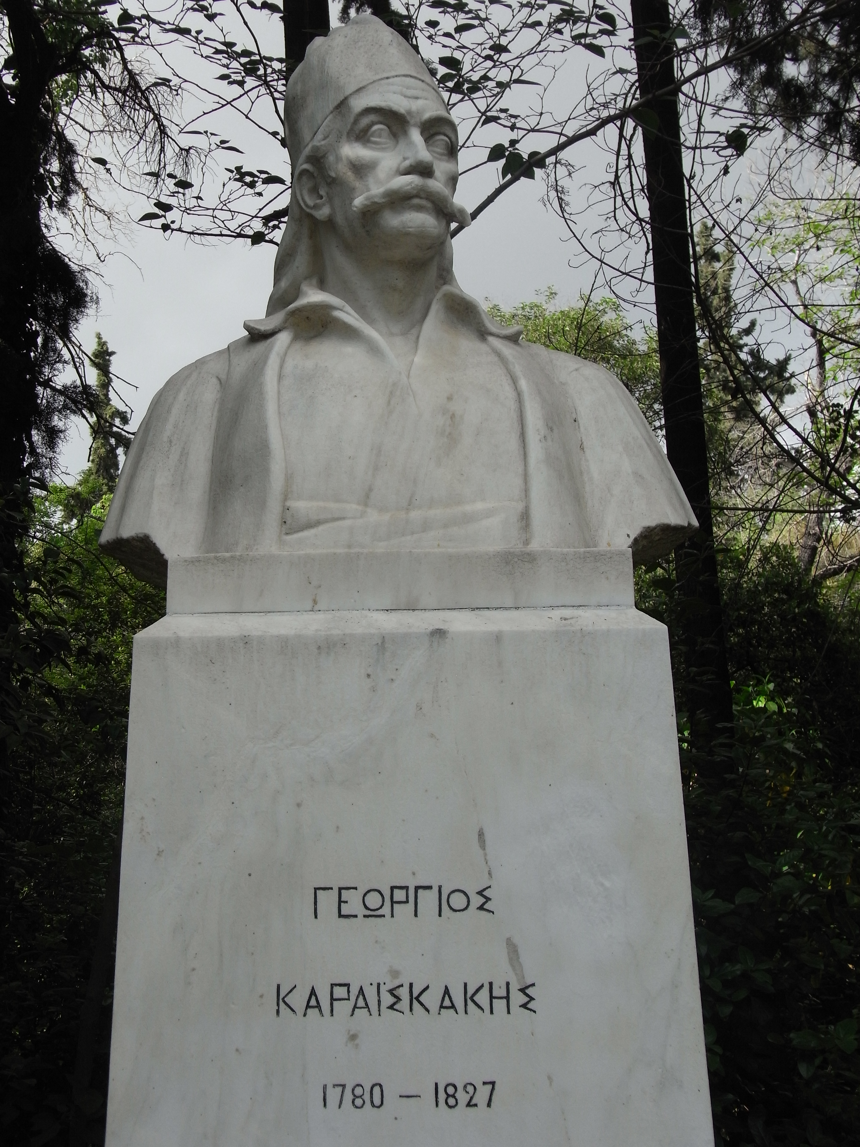 Les combattants de 21 (Αγωνιστές του 21)